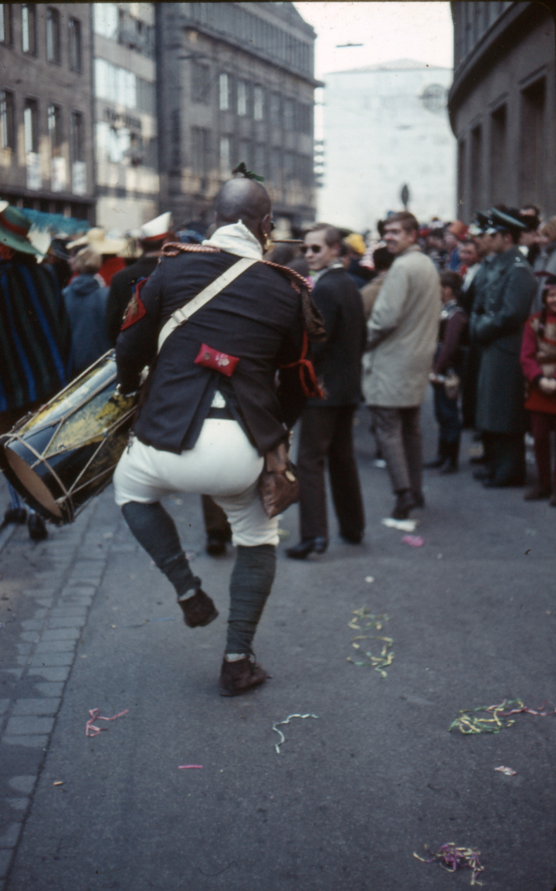 Straßenbild vor dem Kölner Rosenmontagszug 1967